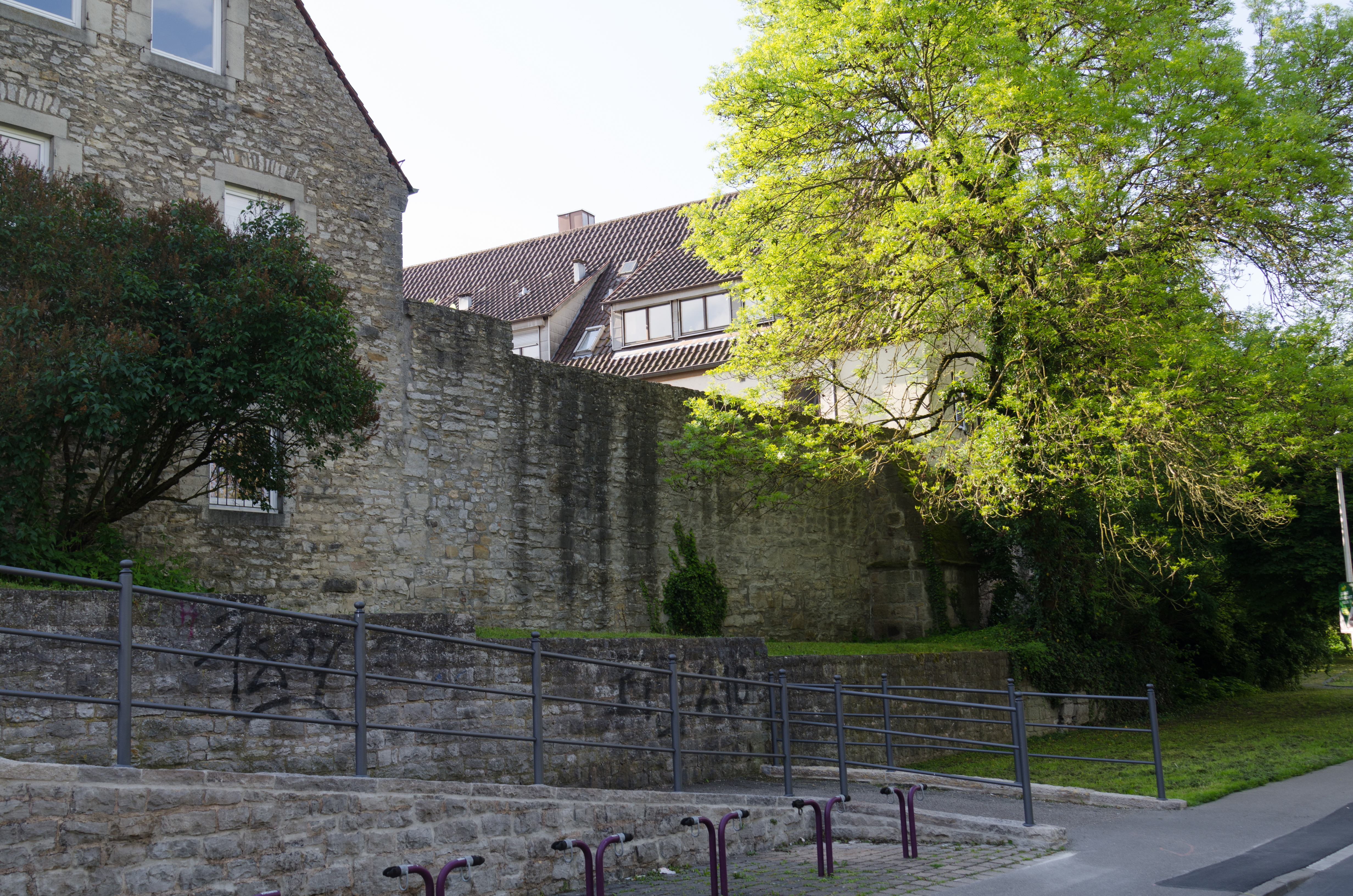 Crailsheim, Stadtmauer, Grabenstraße